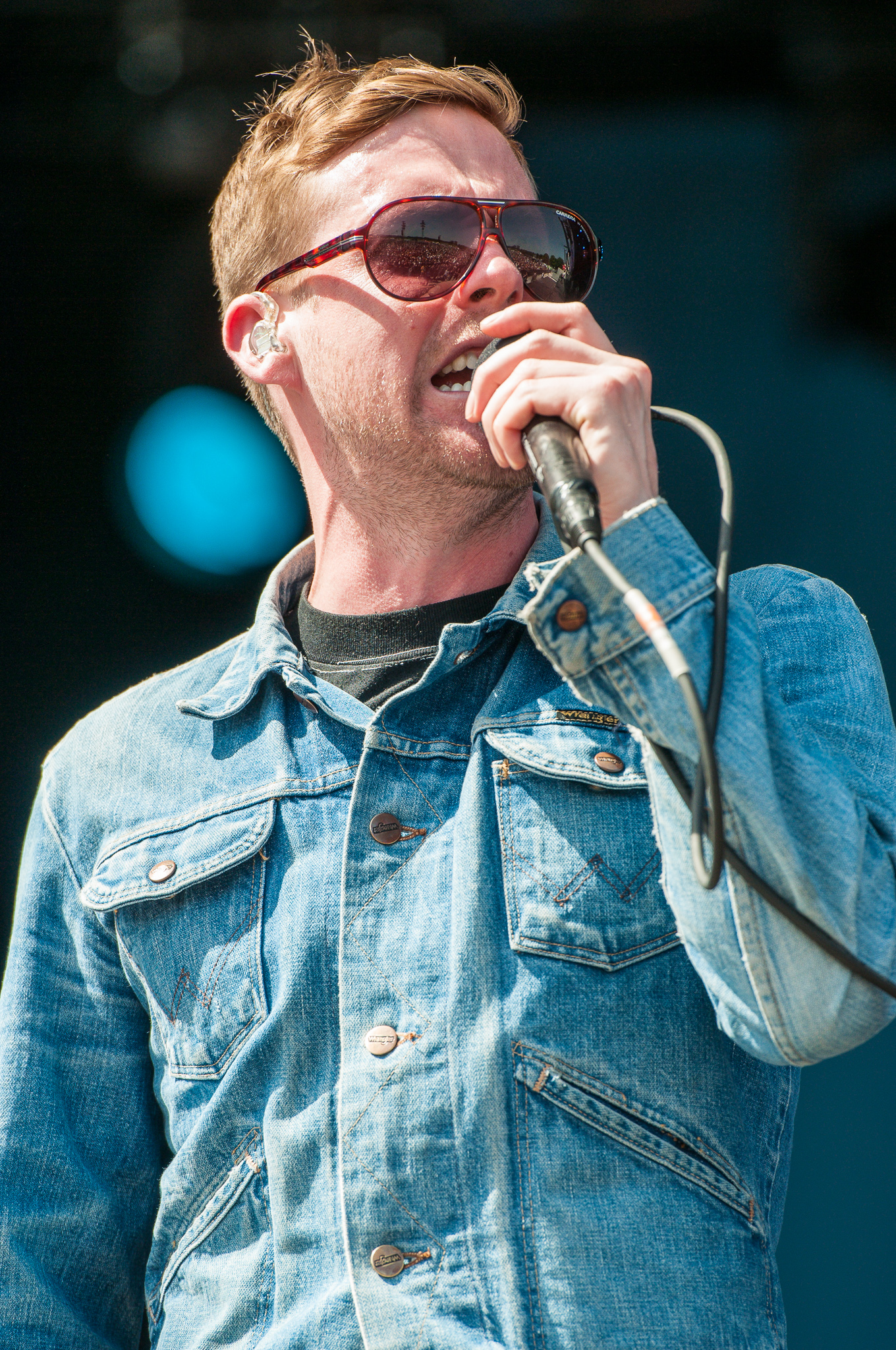 ARGO-Konzerte,Centerstage,Kaiser Chiefs,Konzert,Livekonzert,Livemusik,Musik,RiP,Ricky Wilson,Rock im Park 2014